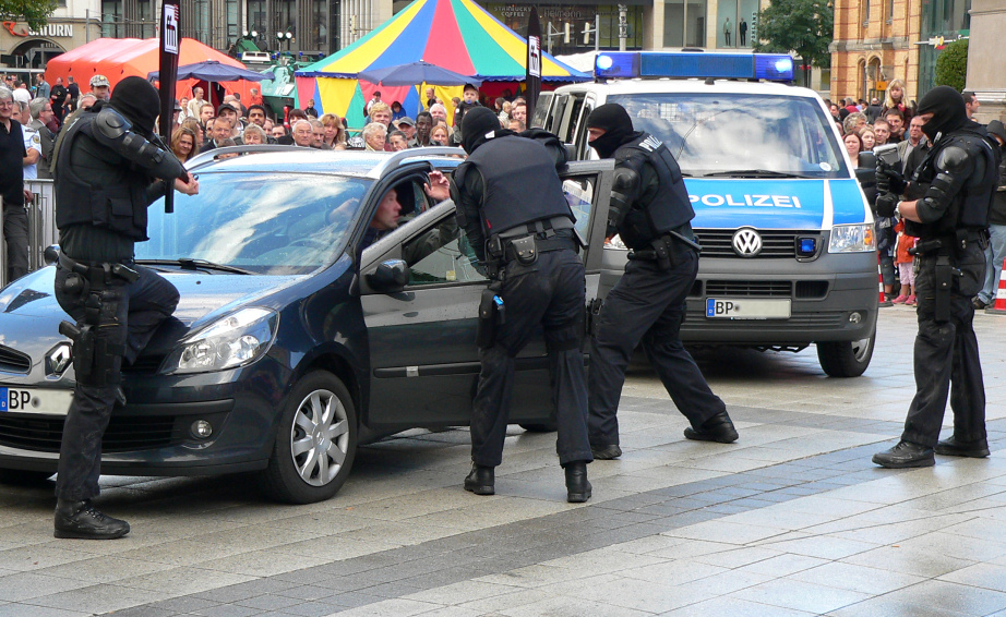 Vorführung durch Festnahmeeinheit der Bundespolizei, Fotoaufnahme bei Veranstaltung "Polizei erleben" am 04./05.09.10 in Hannover auf dem Ernst-August-Platz